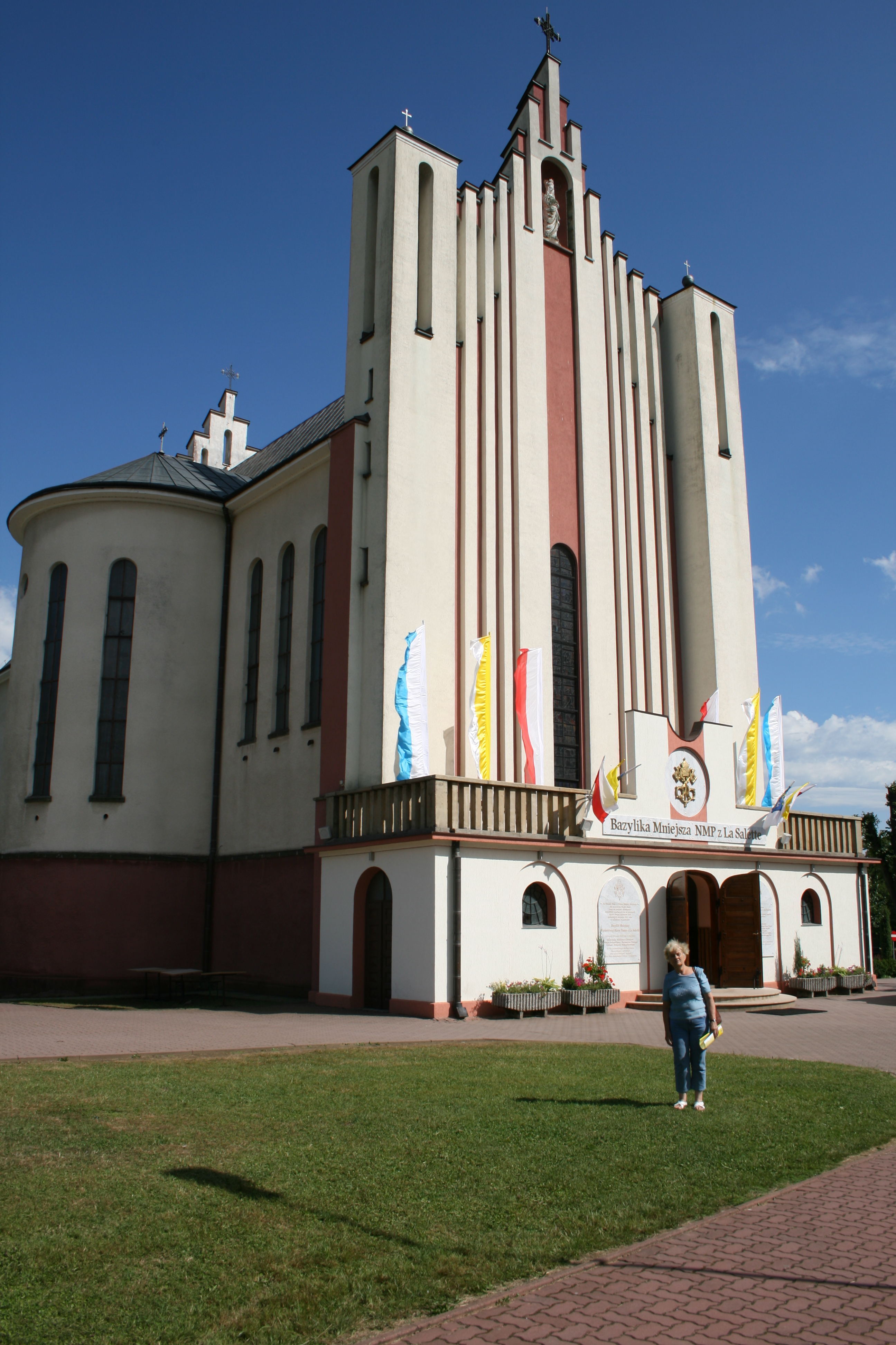 Sanktuarium Matki Bożej Saletyńskiej w Dębowcu